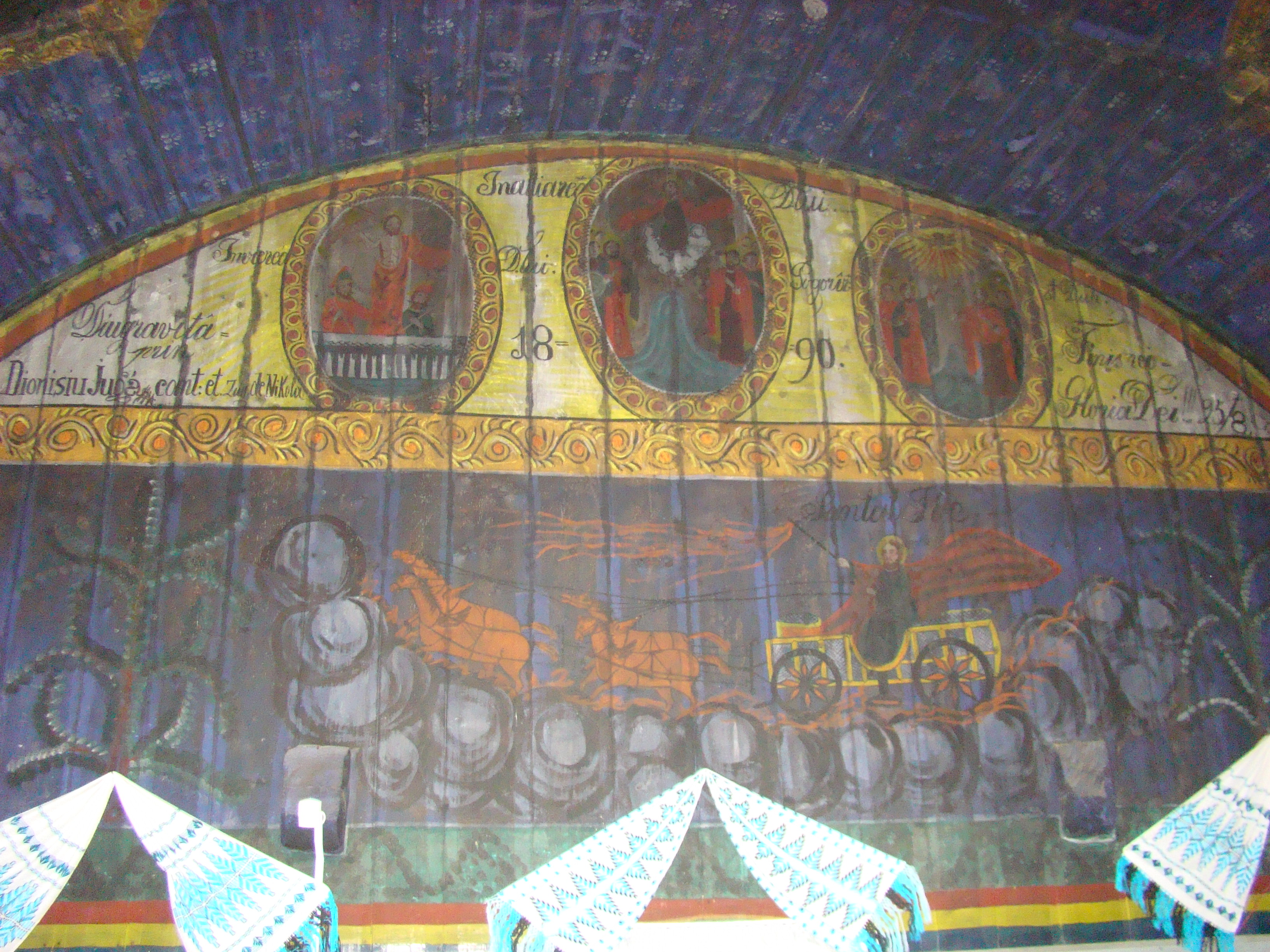 Biserica de lemn „Sfântul Nicolae” din Sulighete, județul Hunedoara